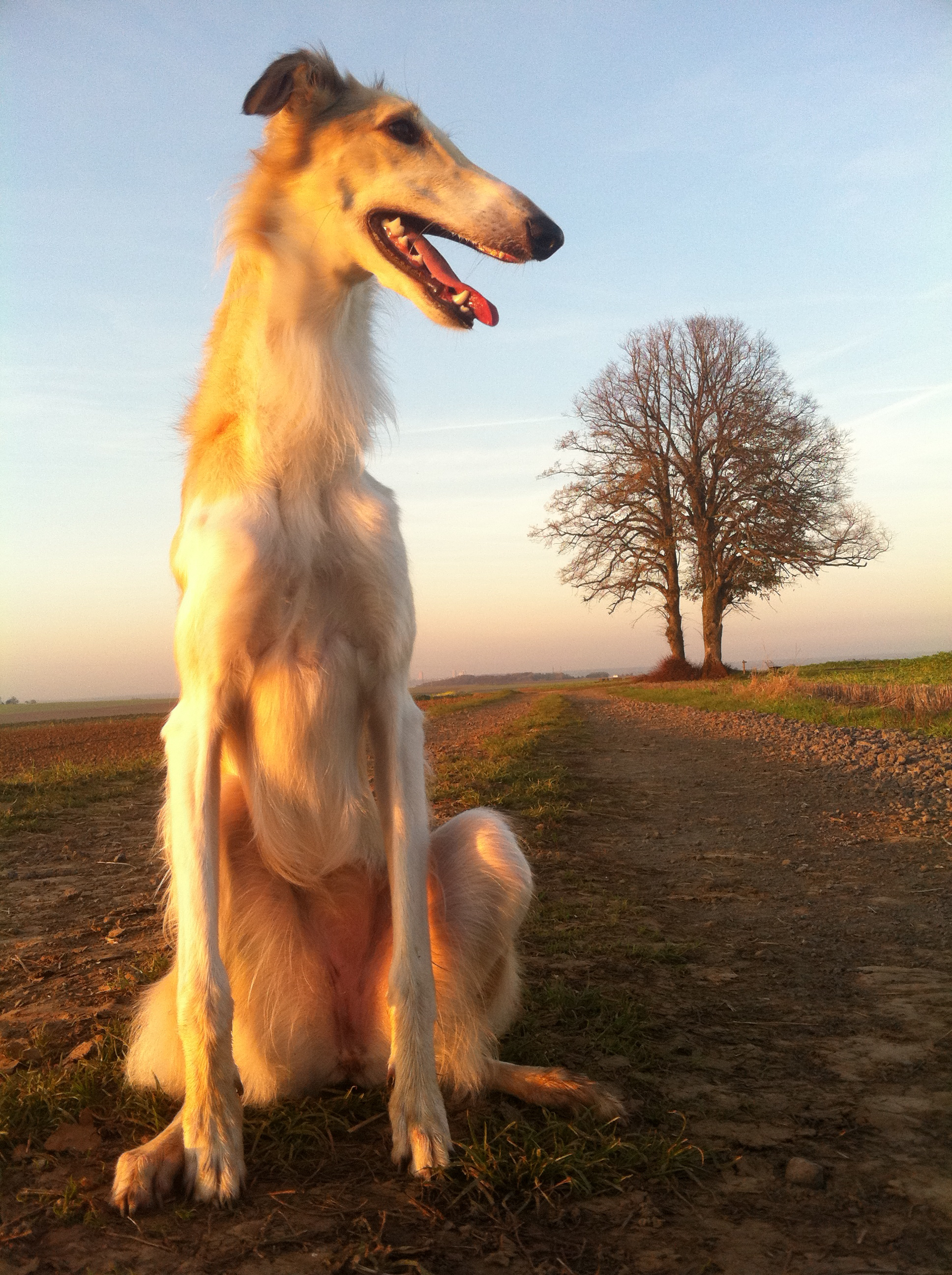 Ballade aux 3 tilleuls de Montmachoux 77940 avec Fly